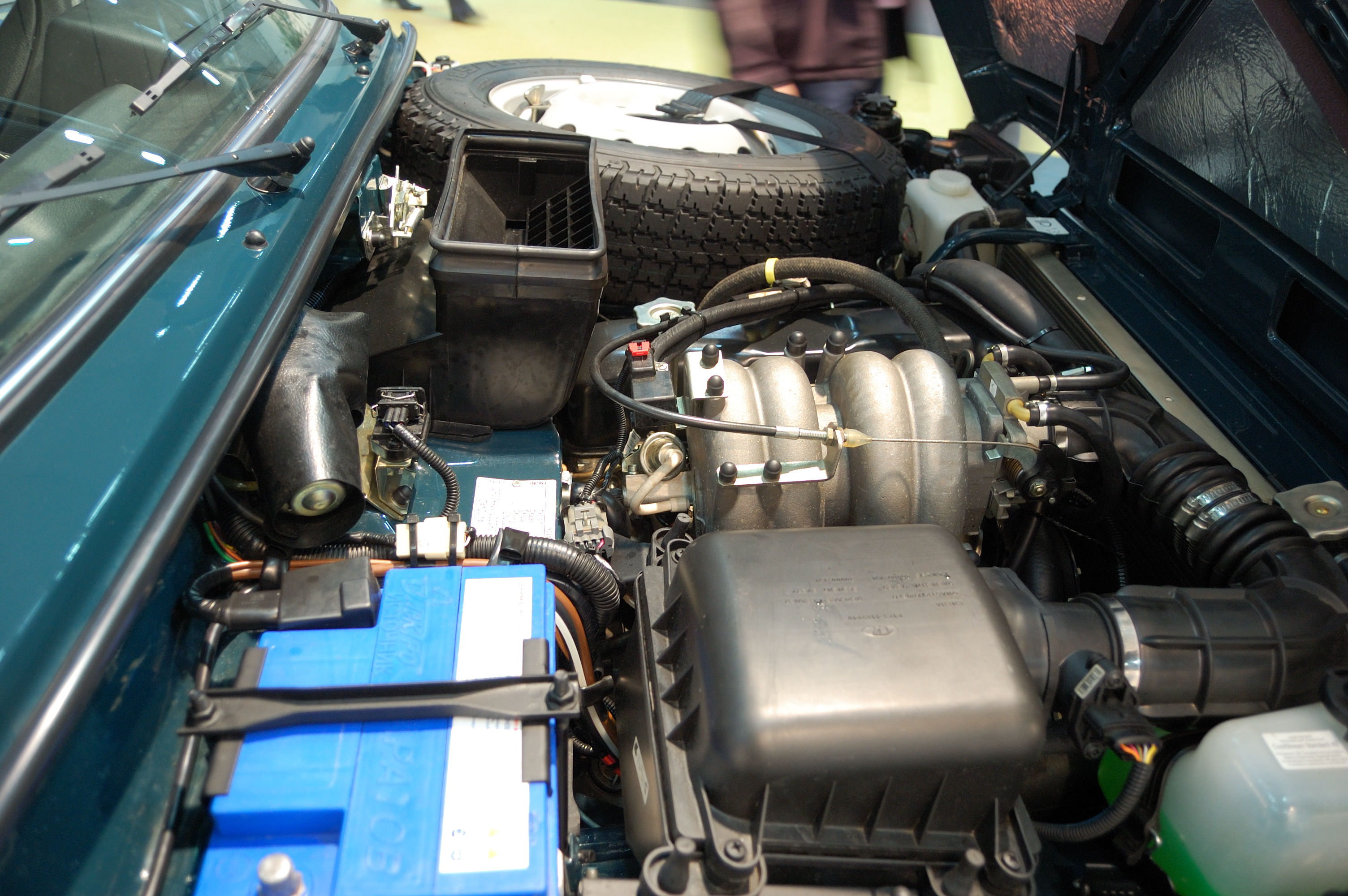 Lada Niva